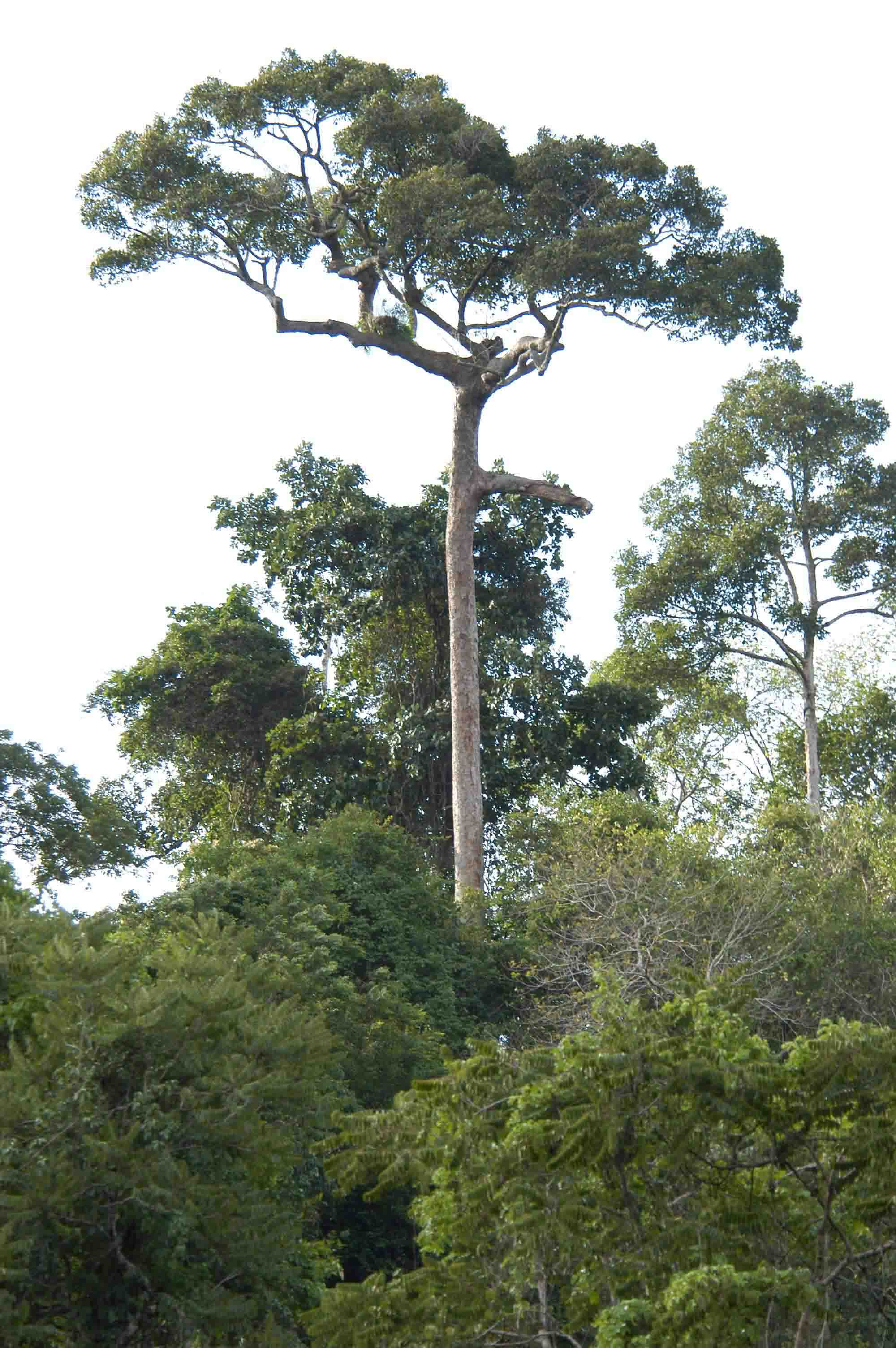 Fût émergeant de la canopée (dipterocarpe) dans la forêt tropicale humide, Khao Yai, Thaïlande.